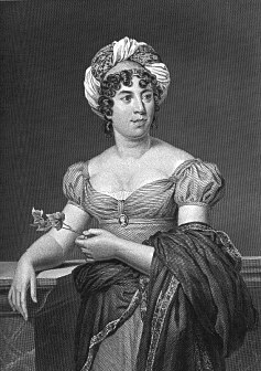 Germaine de Staël